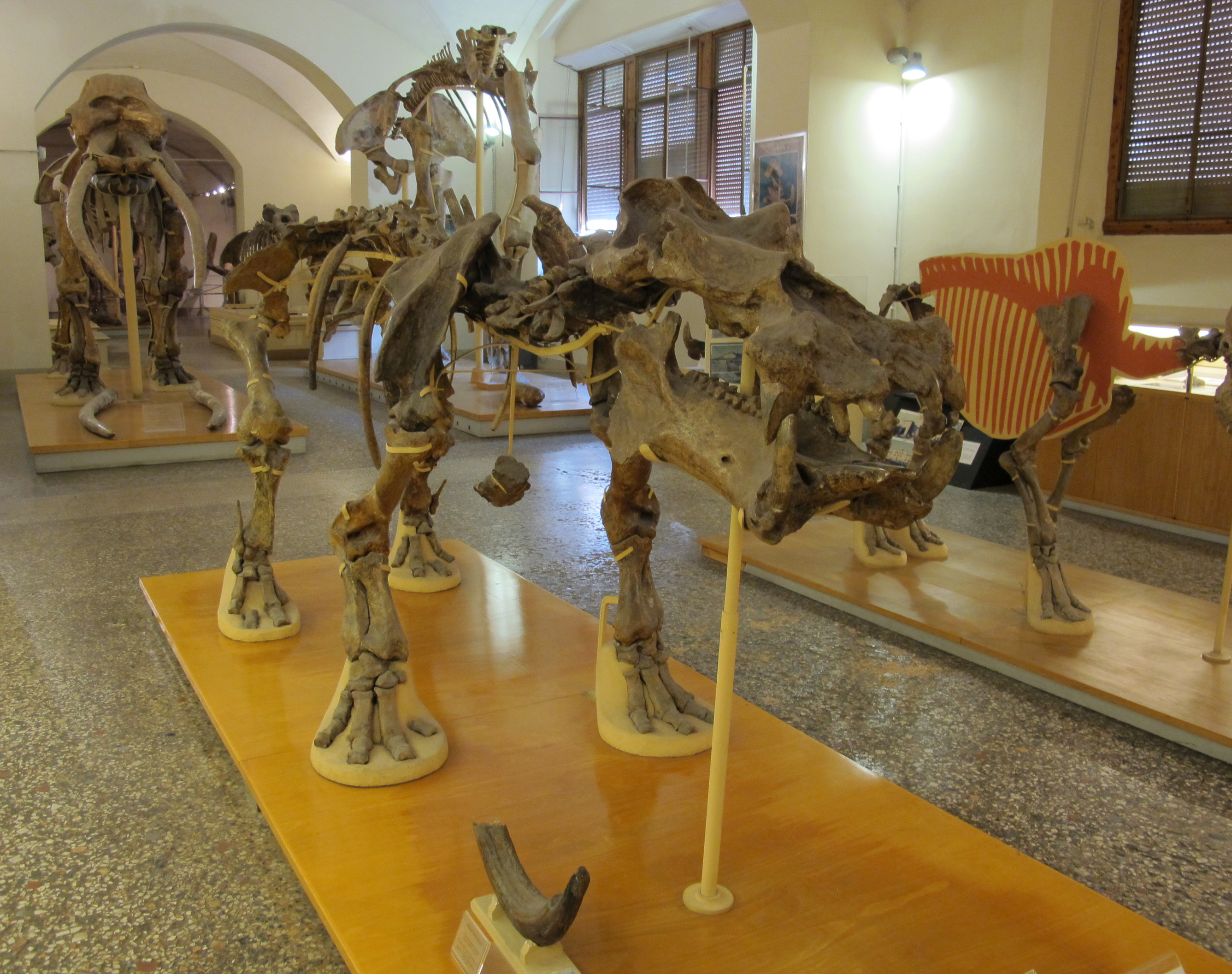 Museo di paleologia, scheletro di hippopotamus antiquus, recuperato presso figline valdarno